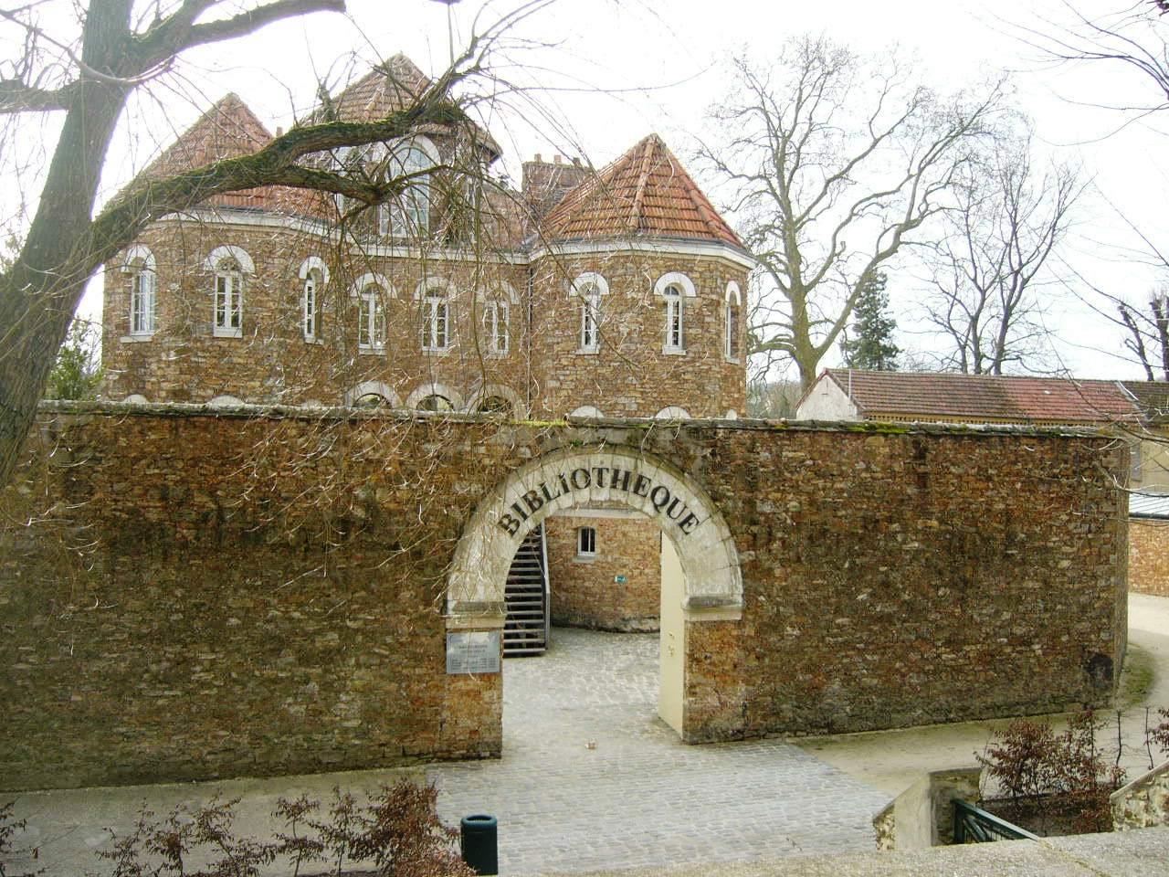 Photographie par So Leblanc de l'ancienne prison de Coulommiers aménagée en bibliothèque